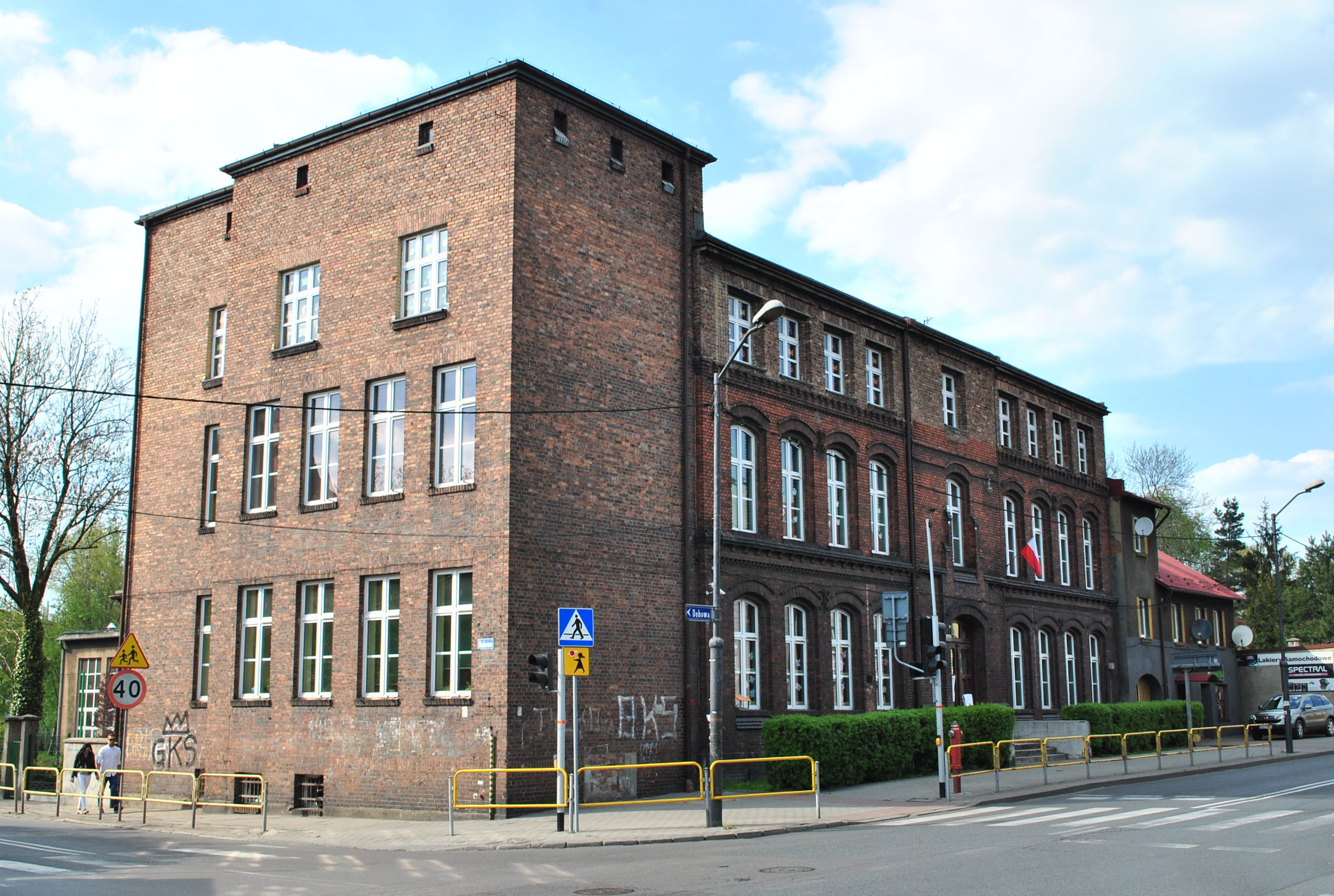 Katowice, Dąb. Szkoła Podstawowa nr 19 im. Wojciecha Korfantego w Katowicach przy ul. Agnieszki 2